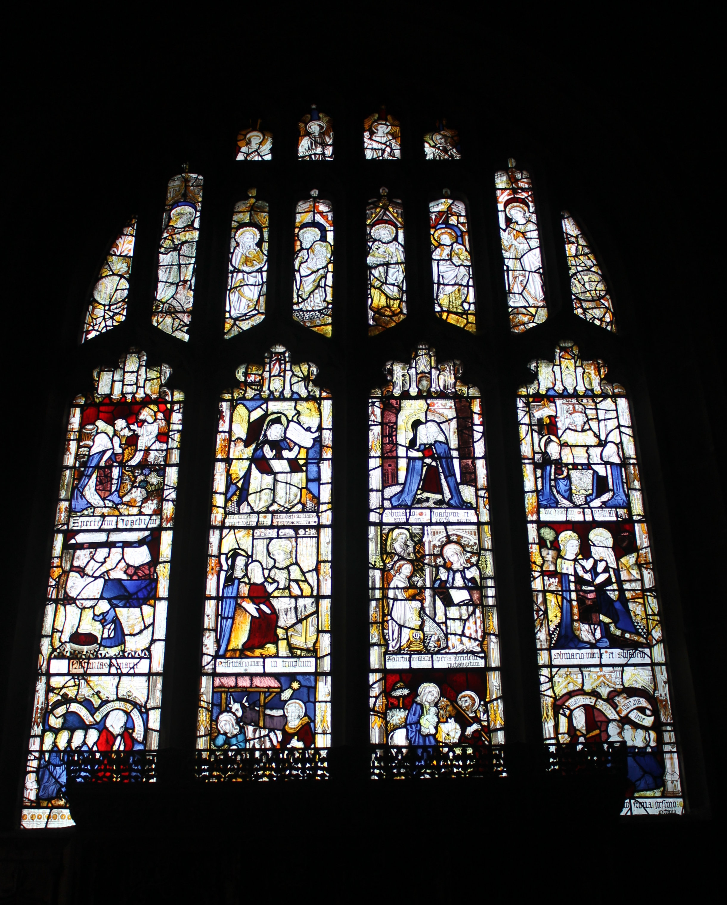 Eglwys yr Holl Seintiau, Gresffordd.